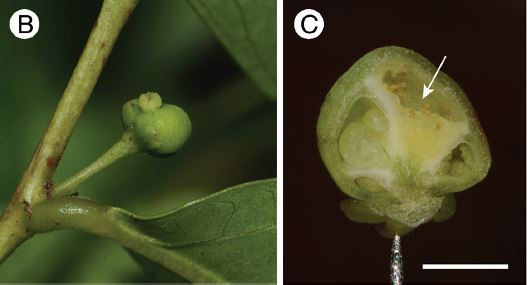 Epicephala corruptrix